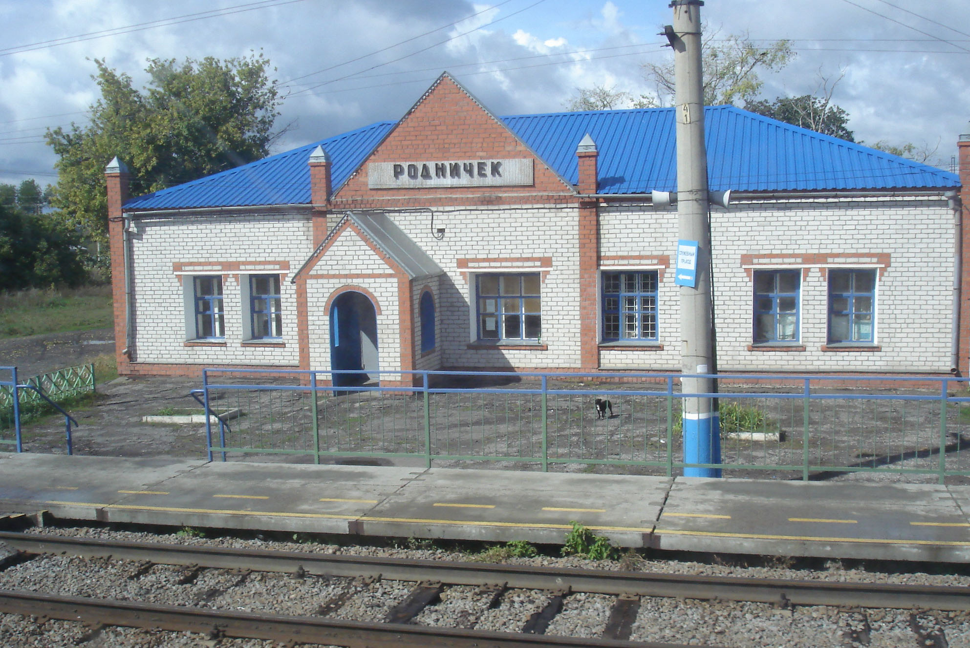 Здание ЖД-станции Родничек